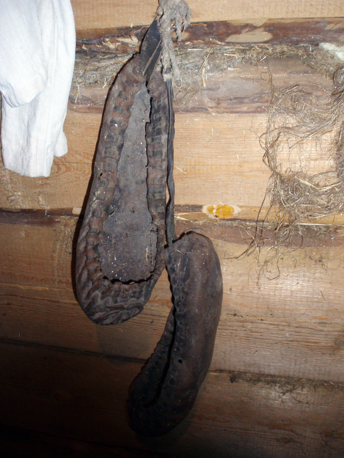 Senovės lietuvių avalynė